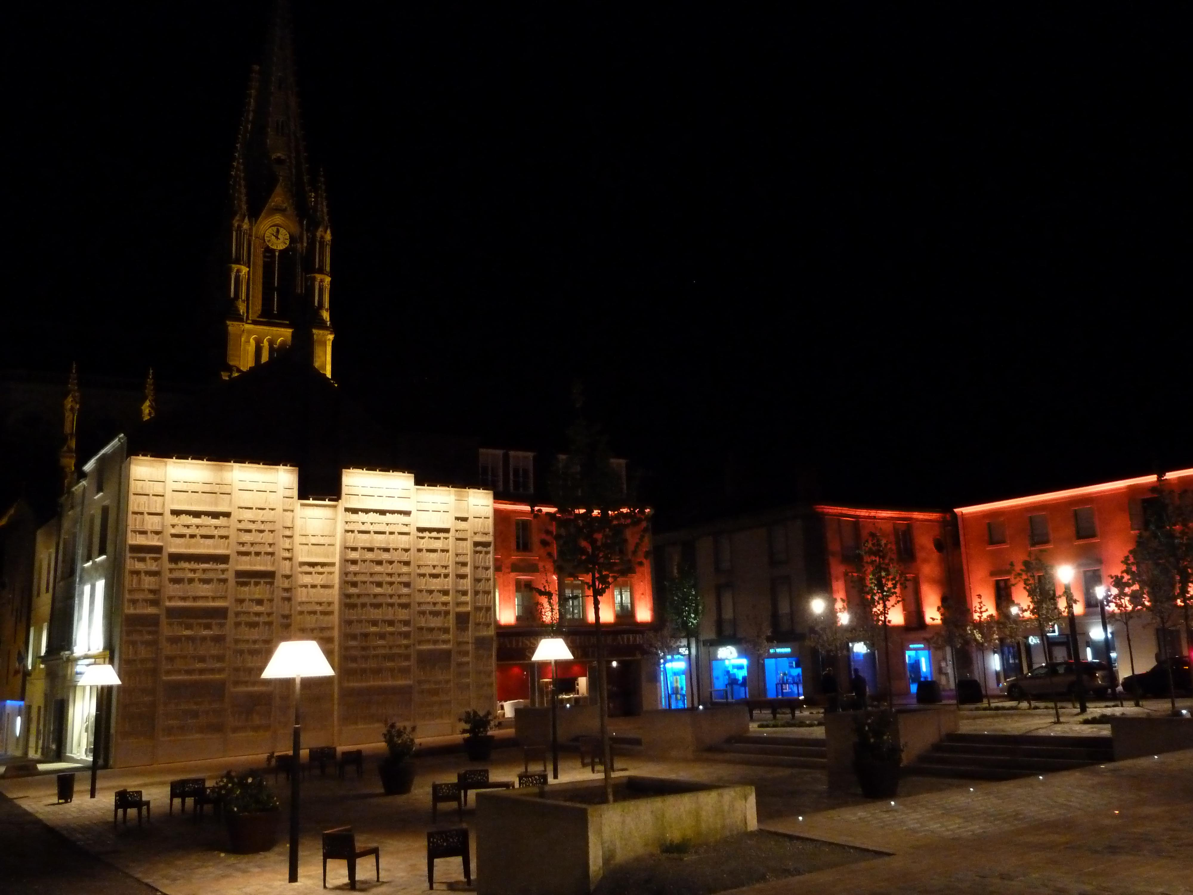 Cholet - Réaménagement du centre ville